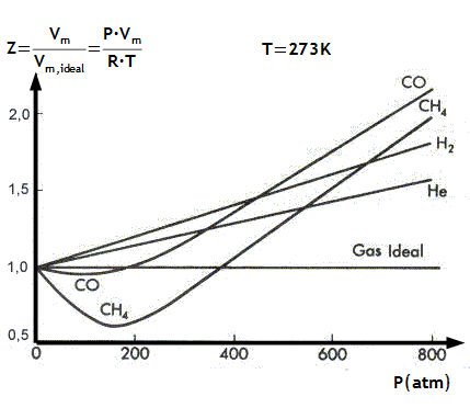 Factor de compressibilitat de varis gasos respecte de la pressió.